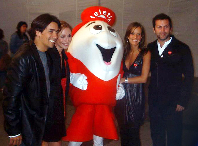 Gira Teletón 2007. De izq. a der.: Rafael Araneda, Karen Doggenweiler, "Teletín", Diana Bolocco y Cristián Sánchez.